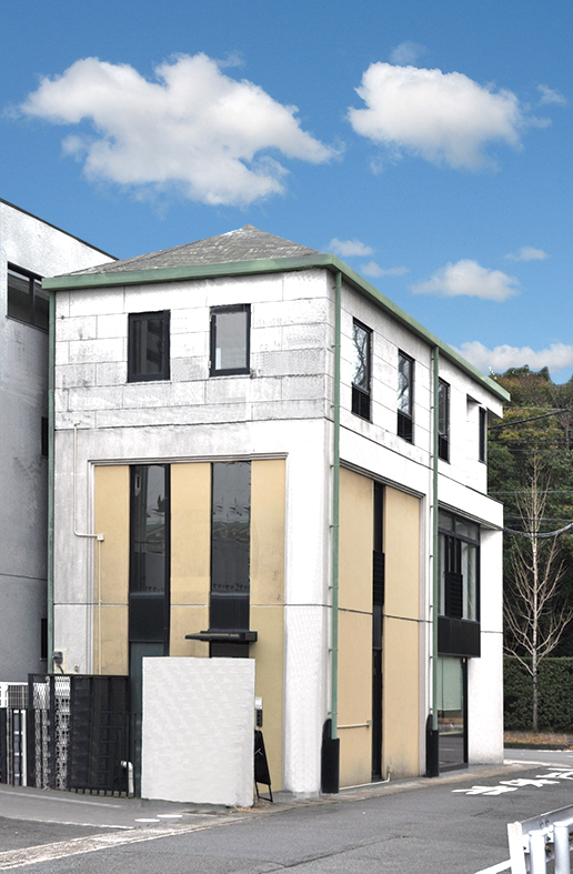 古田織部美術館外観